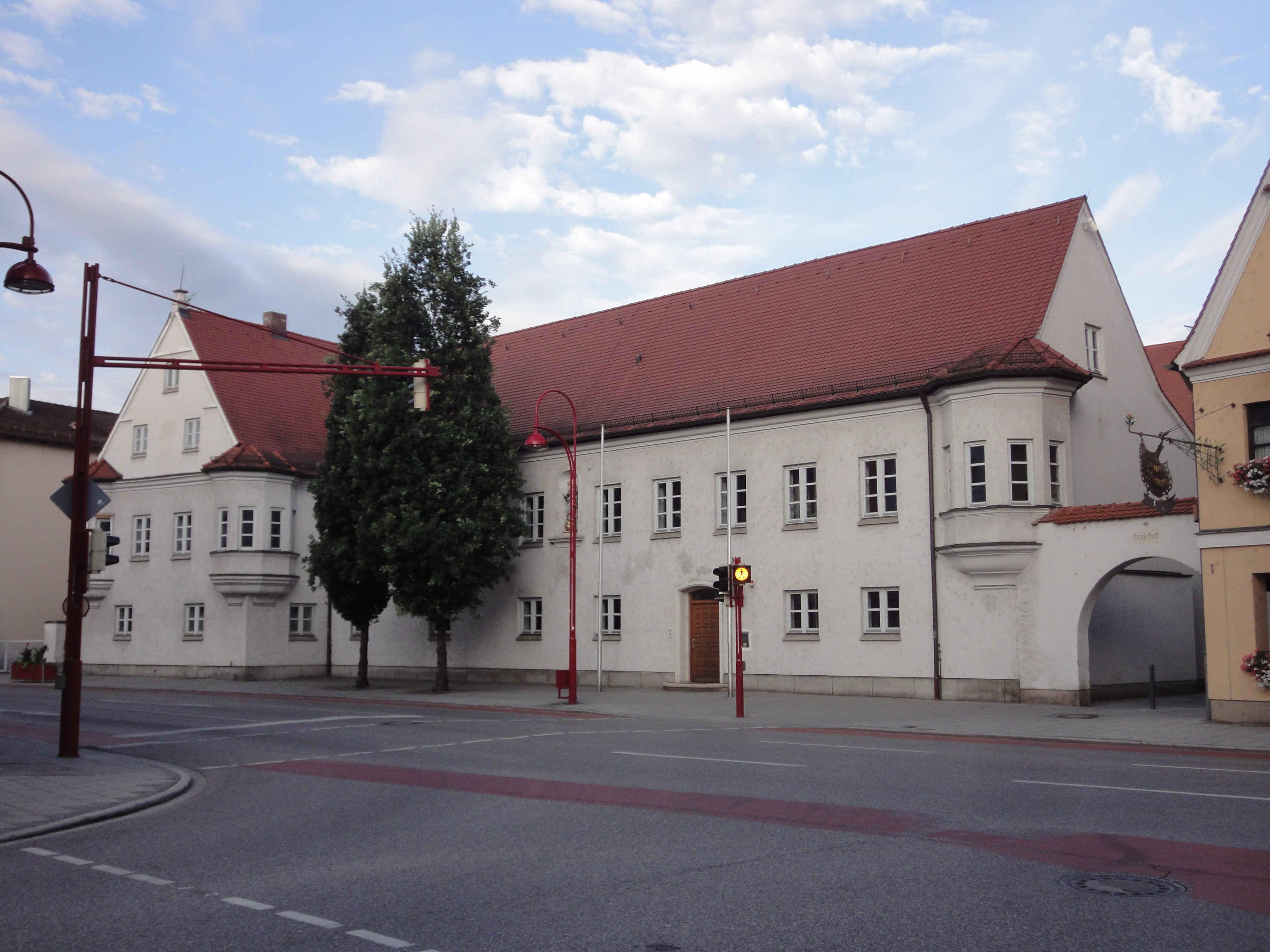 Ehem. Maierhof, dann Rathaus, zweigeschossiger Giebelbau mit Eckerkern und traufseitigem Seitenflügel (Rest einer Dreiflügelanlage), im Kern 1. Hälfte 18.Jahrhundert, anlässlich seiner Einbeziehung in den neuen Rathauskomplex 1993–95 stark verändert.